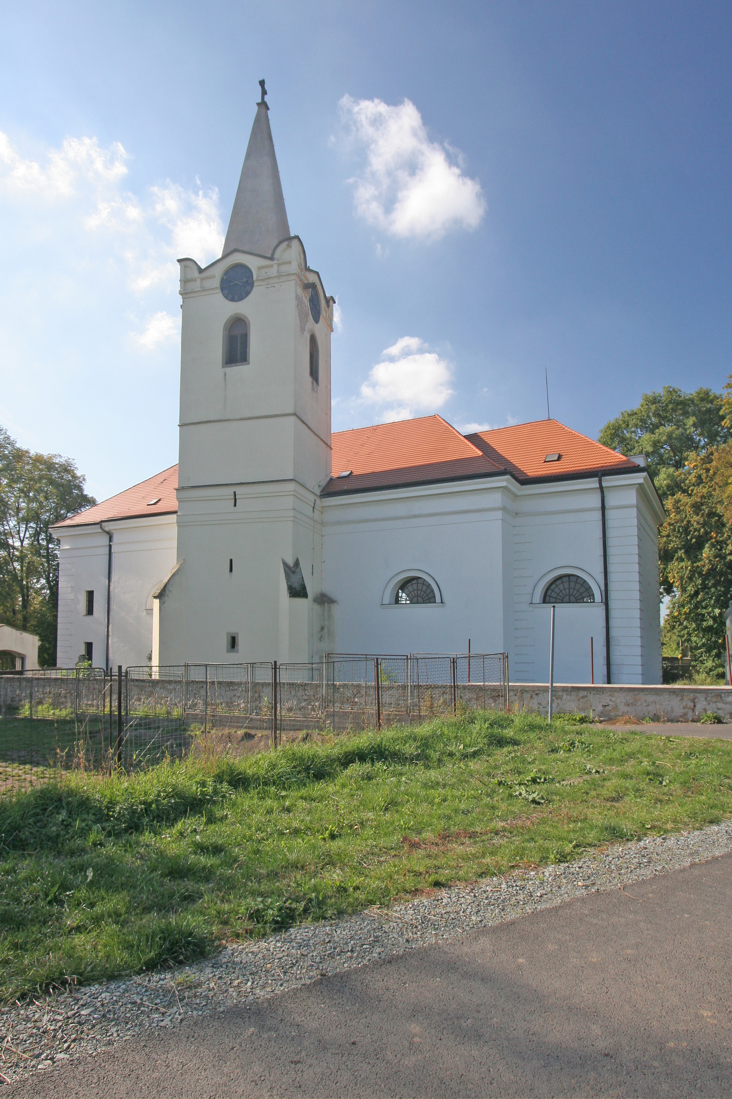 Kostel Nejsvětější Trojice (Všestary), Všestary